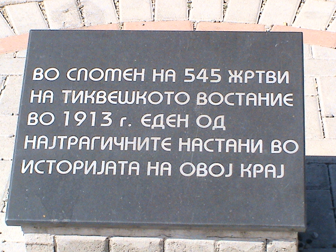 Мемориална плоча за Тиквешкото въстание в Кавадарци.